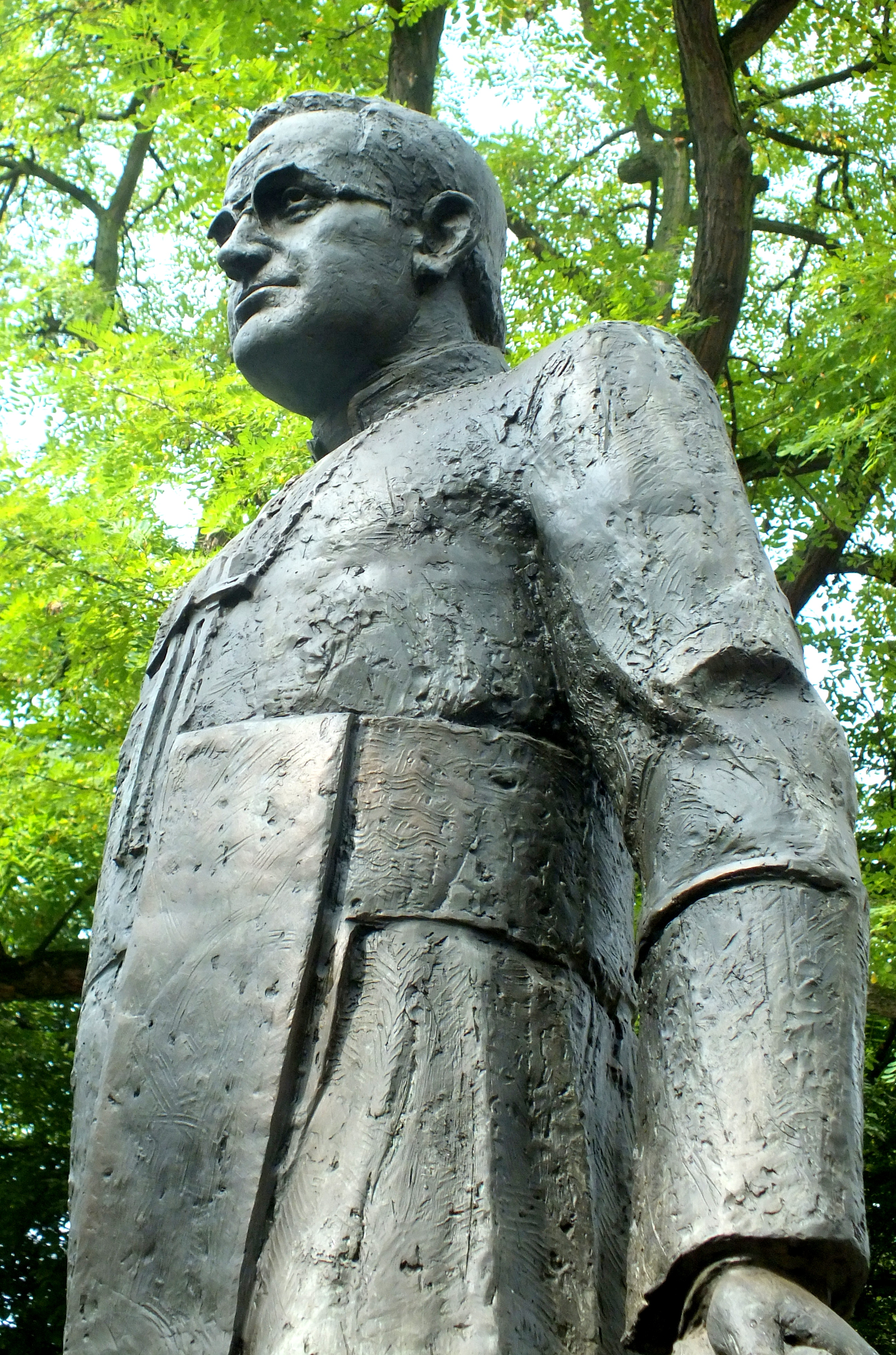 Gdańsk, pomnik ks. prałata Henryka Jankowskiego